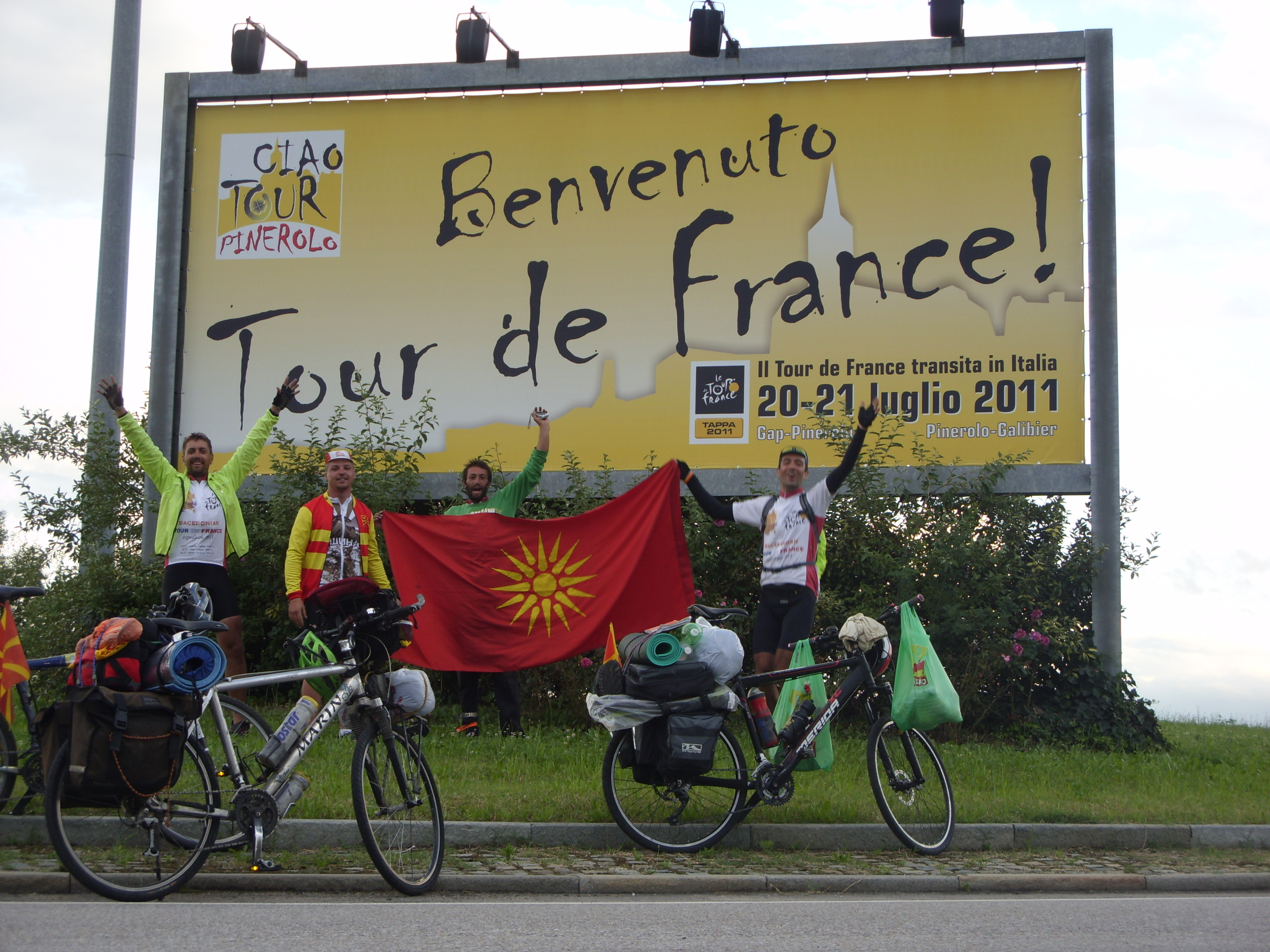 Членовите на МТдФЕ 2011 на влезот во Пинероло